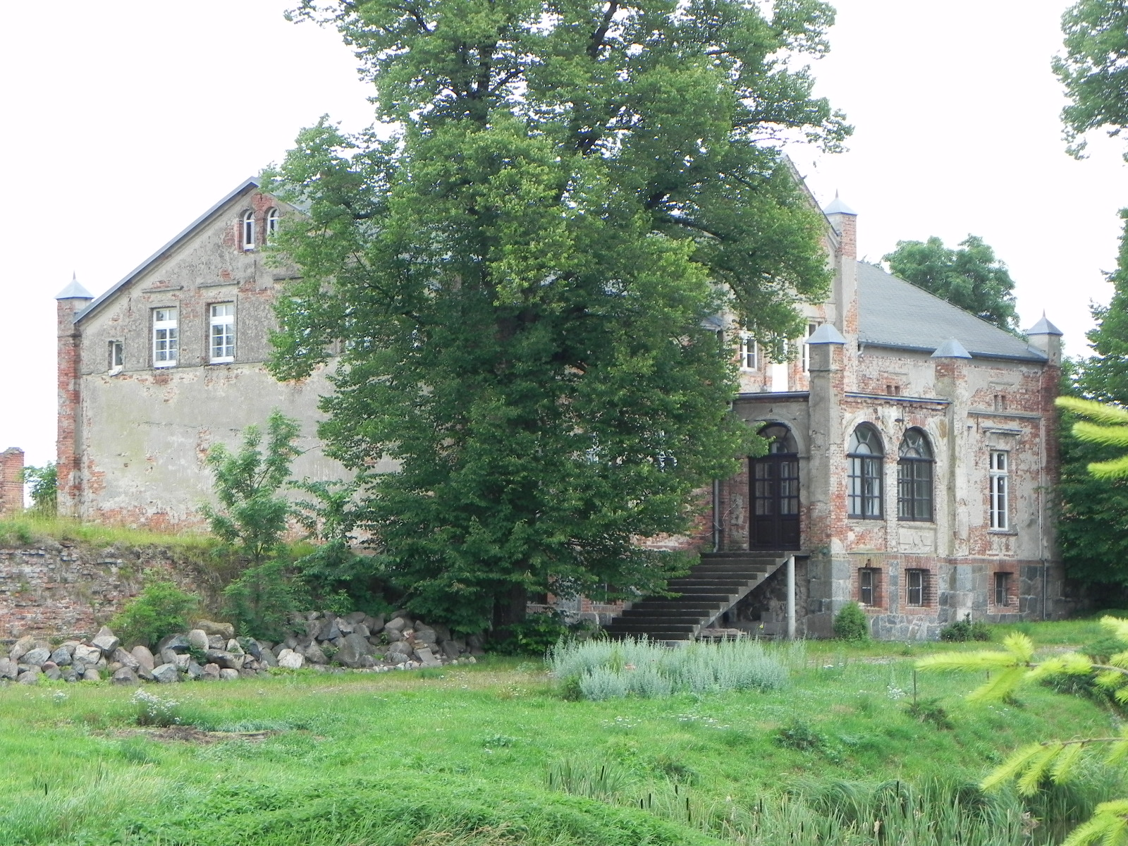 Castle in Zamek Kiszewski